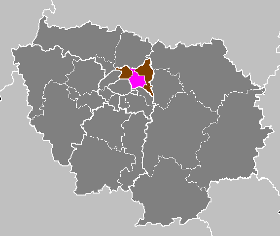 Maps of arrondissements and cantons of France: Département de la Seine-Saint-Denis - Arrondissement de Bobigny.PNG (Région Île-de-France)